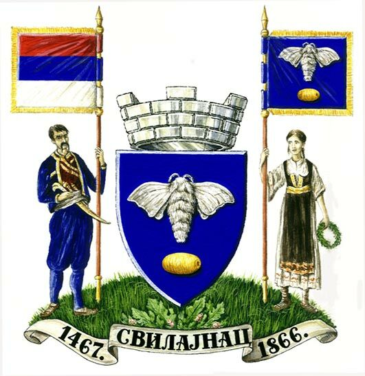 Ова слика је са вебсајта Српског хералдичарског друштва "Бели Орао". Википедија има дозволу за коришћење материјала са тог сајта под лиценцом, уз услов истицања извора.